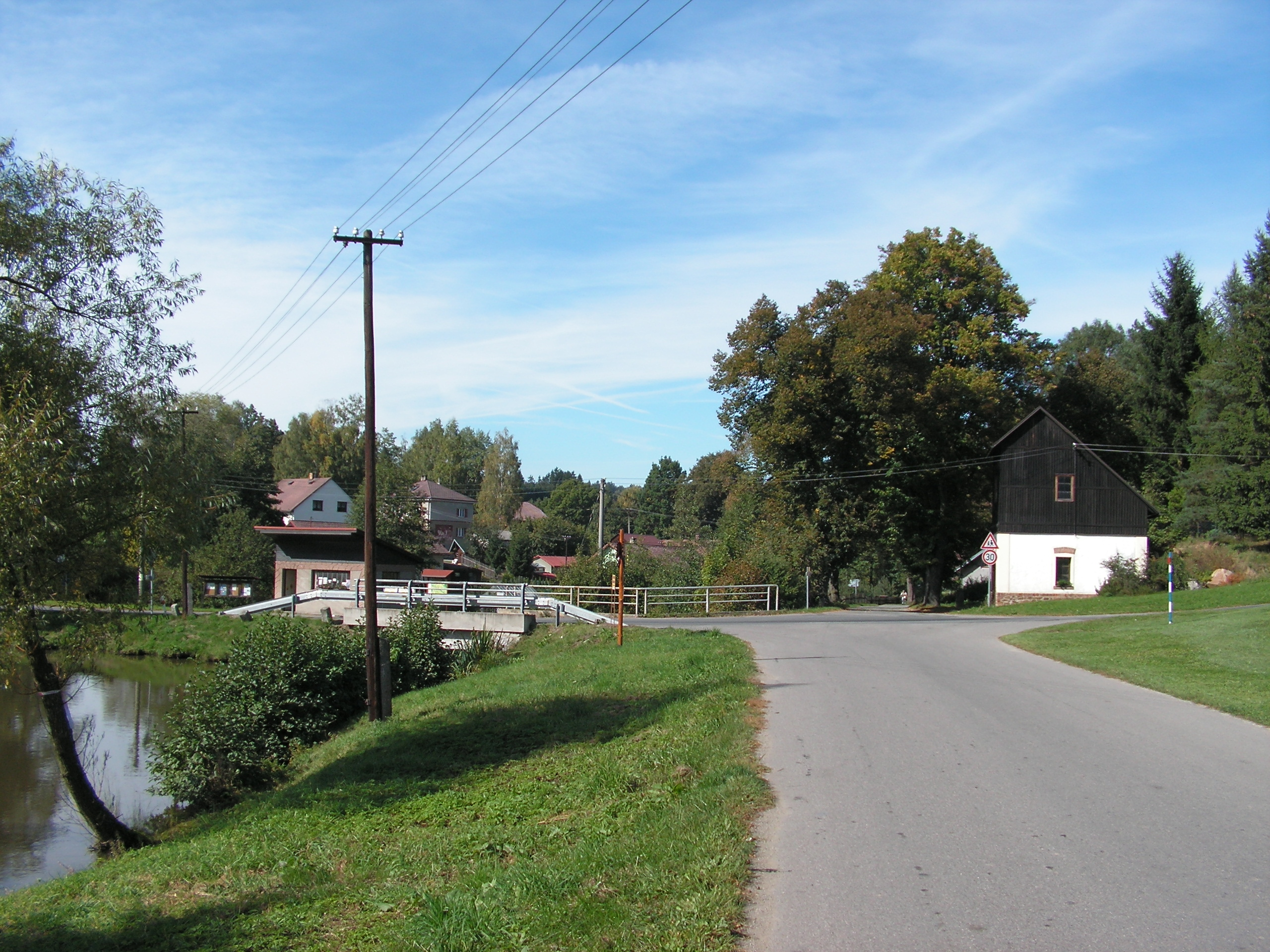 Obec Dlouhá Ves nacházející se v okrese Havlíčkův Brod.